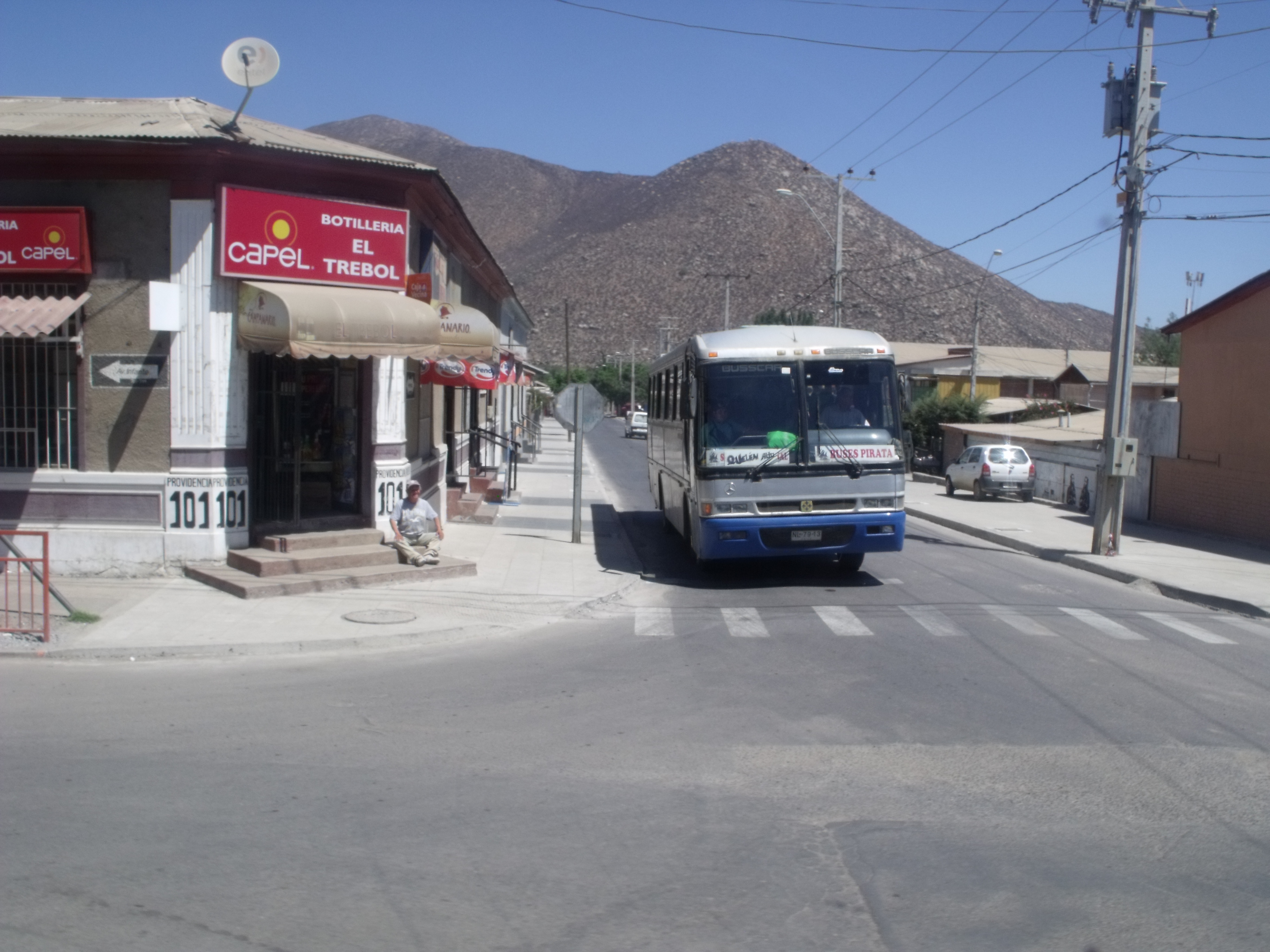 Salamanca es una ciudad chilena y comuna